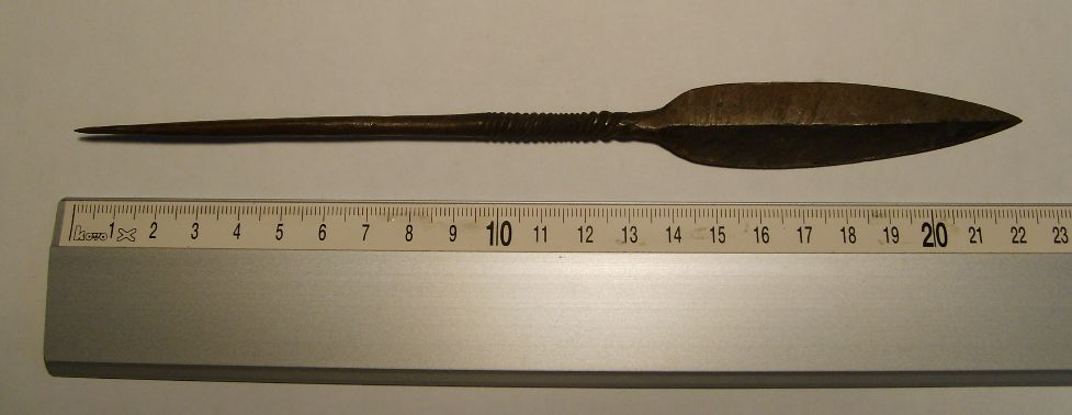 East african arrowhead (Tanzania)